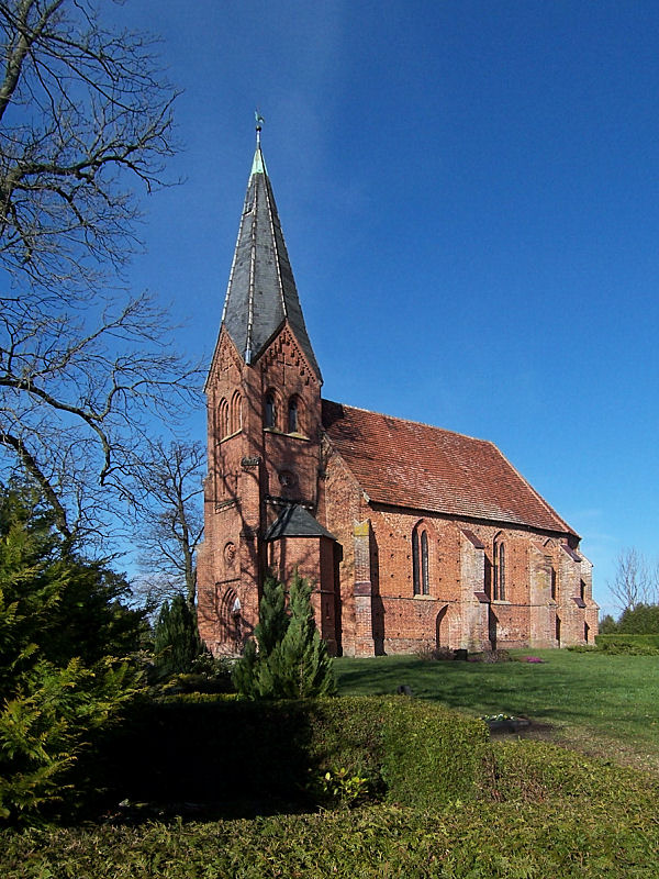 Kirche in Buchholz, Dobin, Landkreis Ludwigslust-Parchim